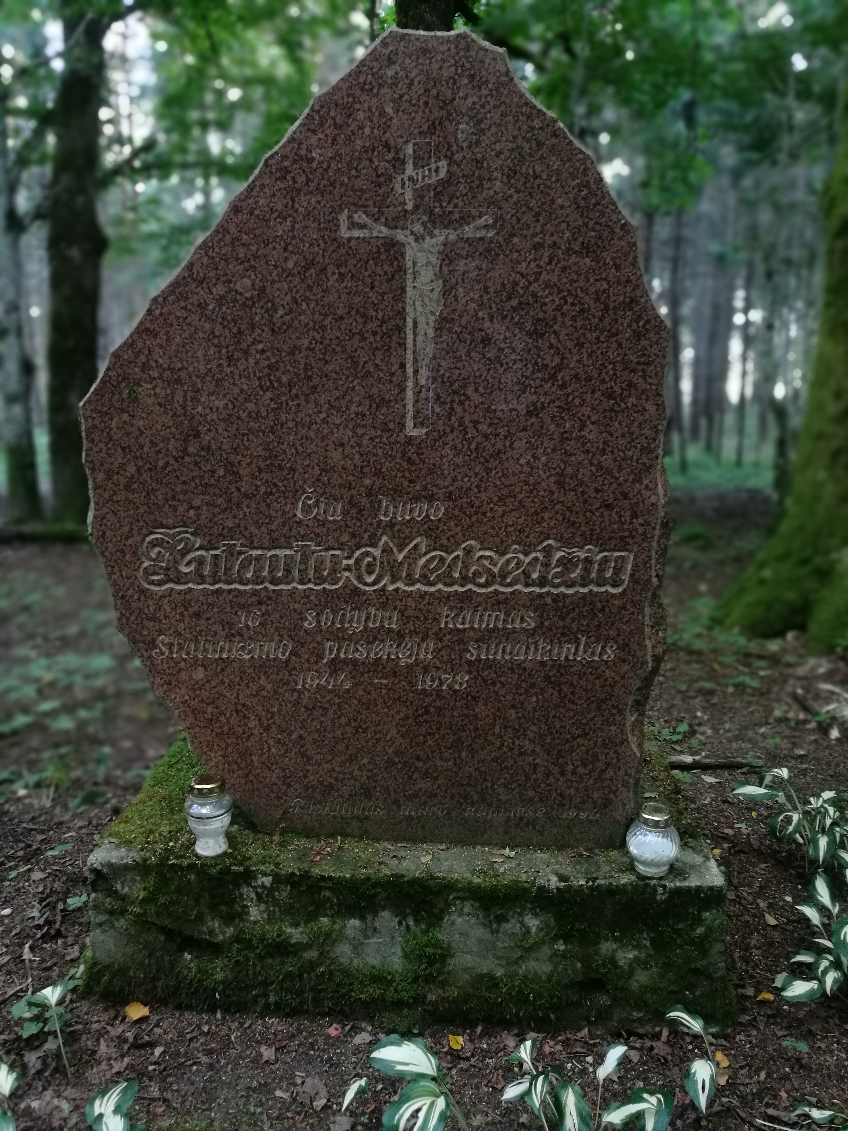 Nuotrauka daryta 2017 m. liepos 29 d.